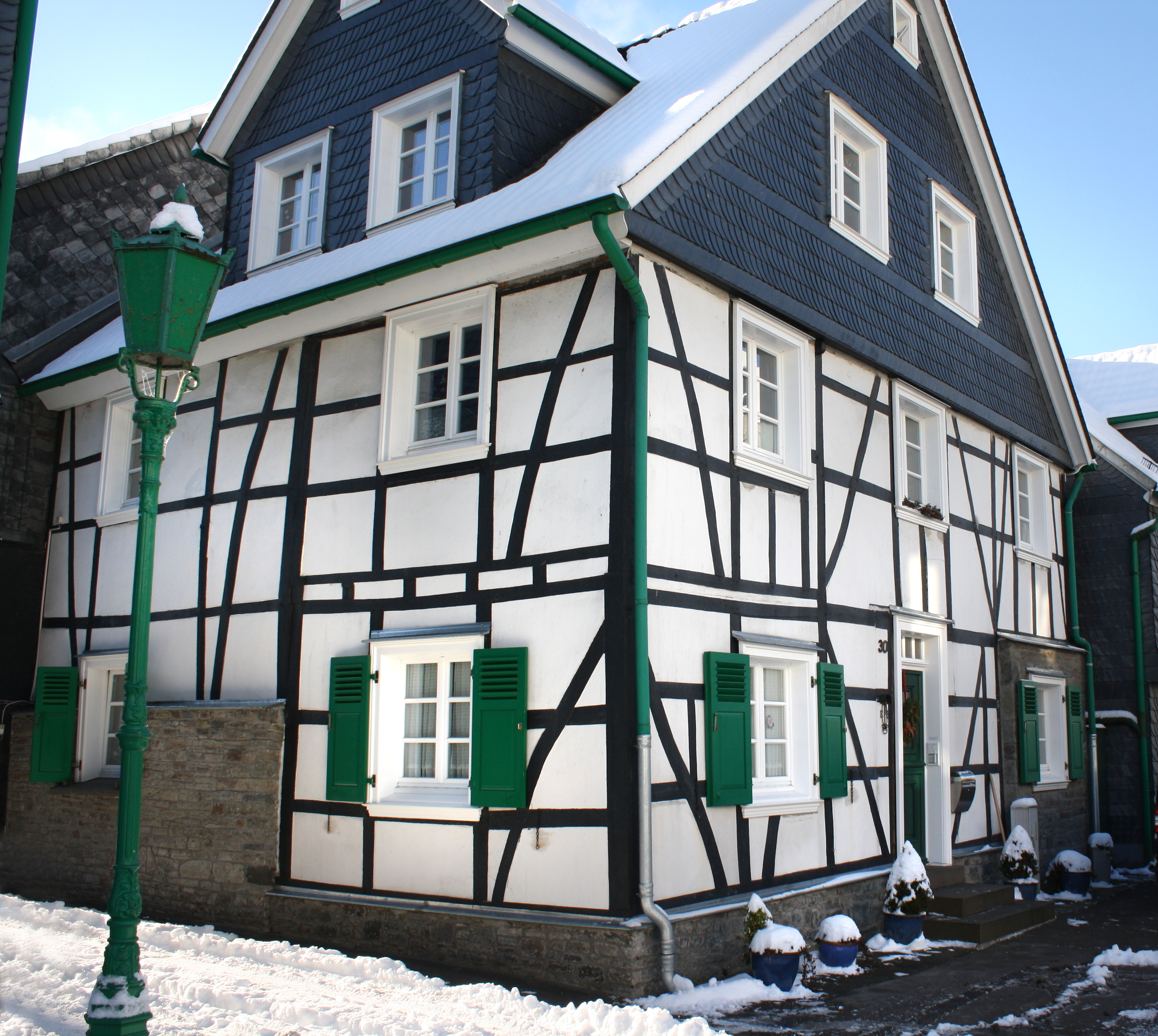 Wuppertal-Beyenburg, Am Untergraben 30; Wohnhaus 6 januari 2009, 11:09:49